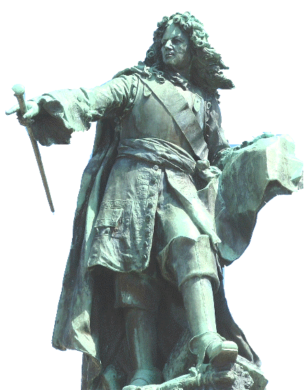 Public Domain, Vauban-Statue von Anatole Guillot in Saint-Léger-Vauban Bronze, commande de l’État 1904, salon des artistes français, 1905, n°3223.